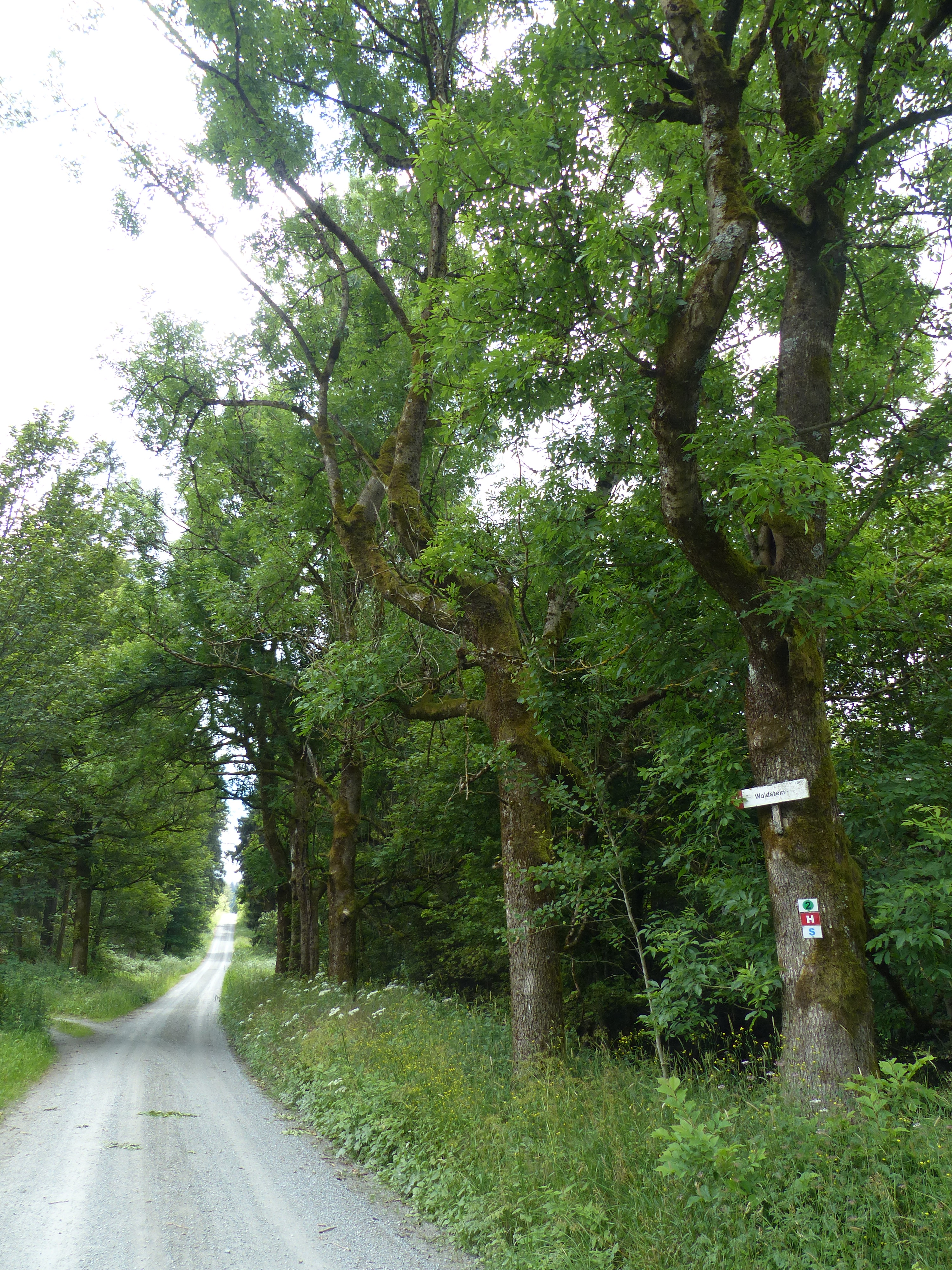 Areal Weidenbrunnen Waldstein